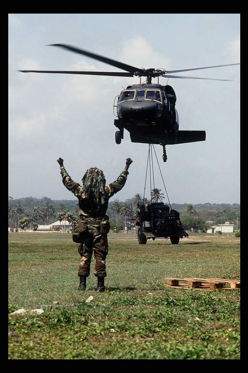 AN/TPQ-36 medium-range Firefinder radar being lifted